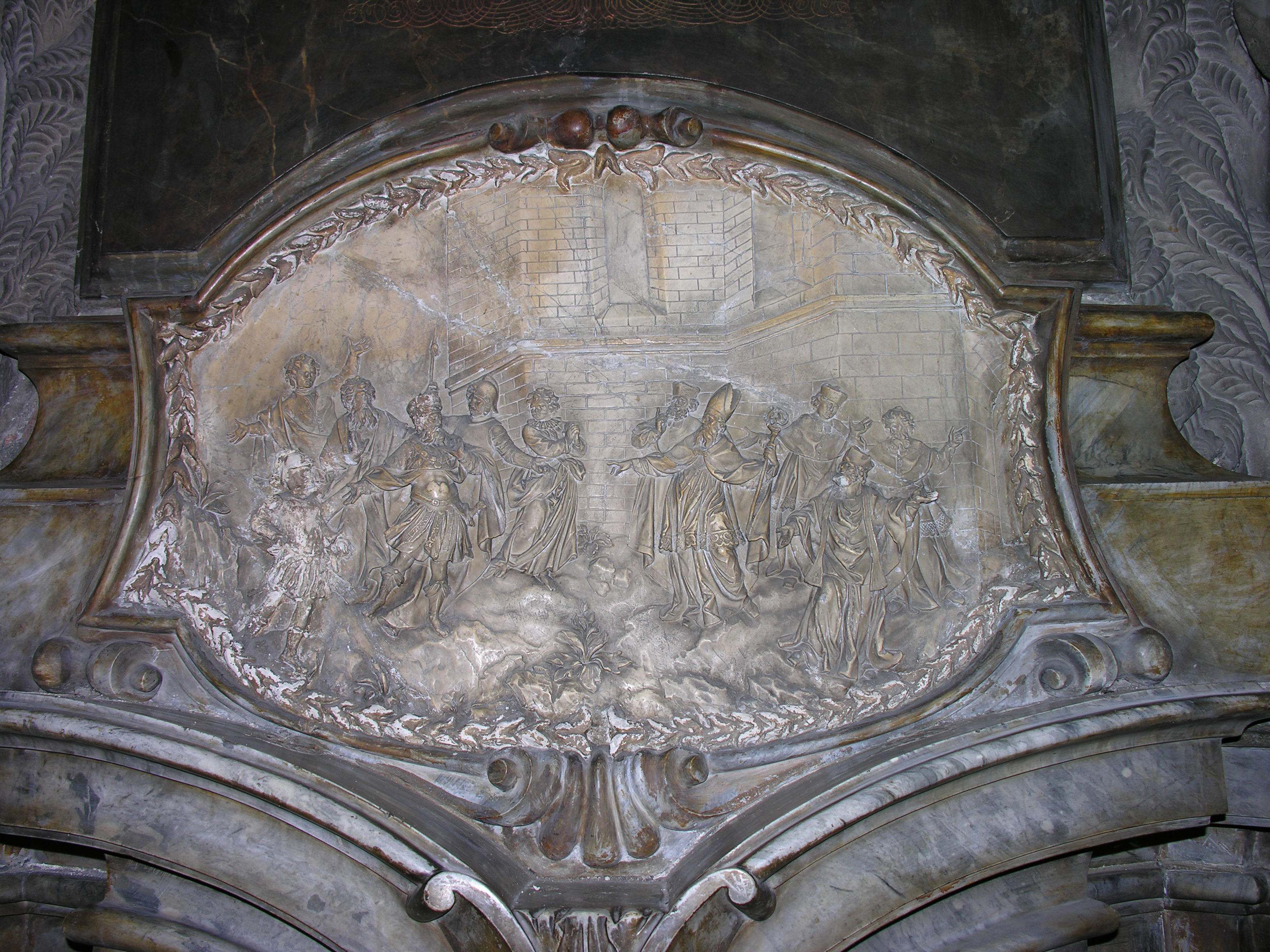 Wrocław. Katedra św. Jana Chrzciciela. Wyklęcie Jana Luksemburskiego